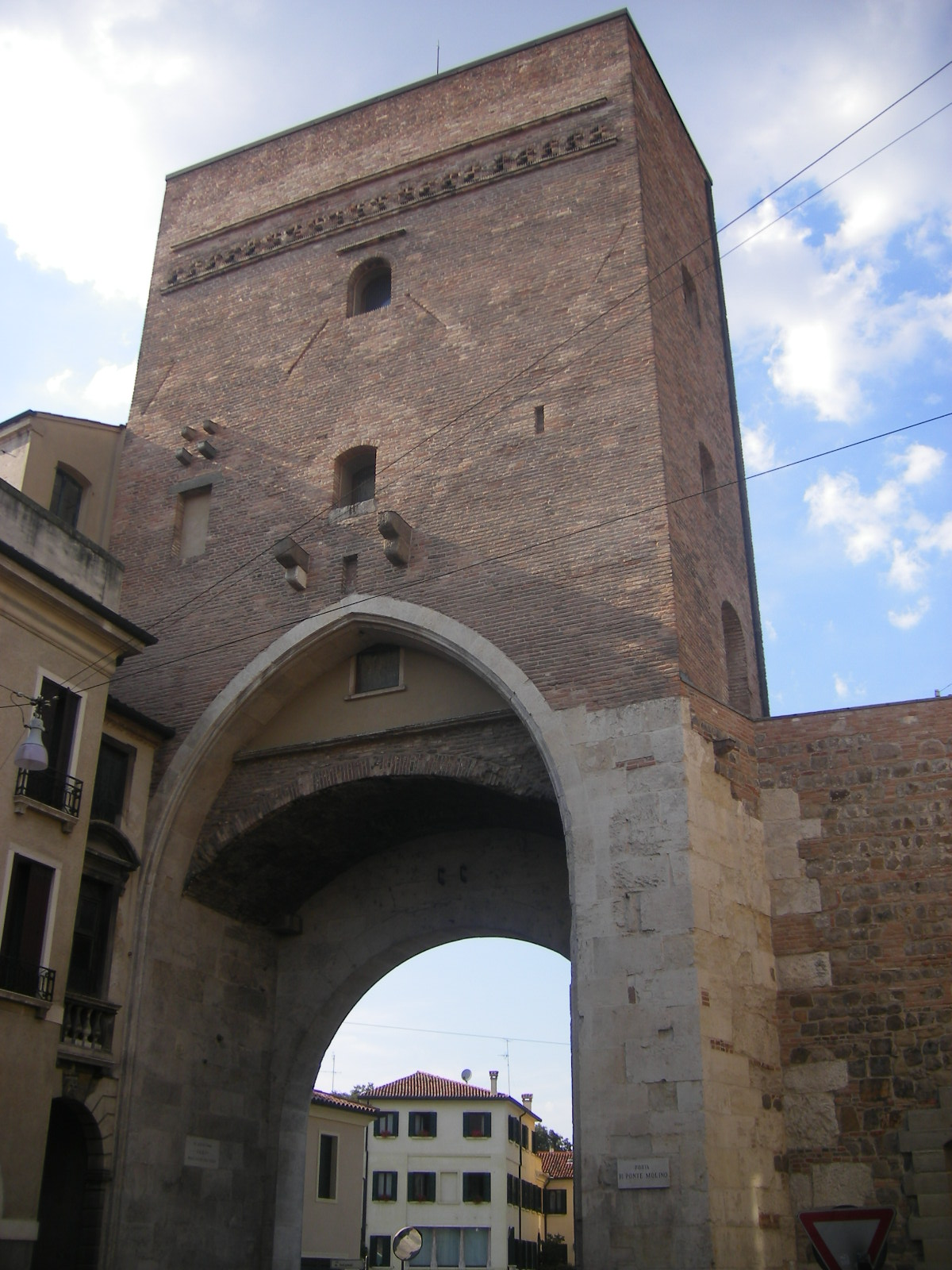 Padova